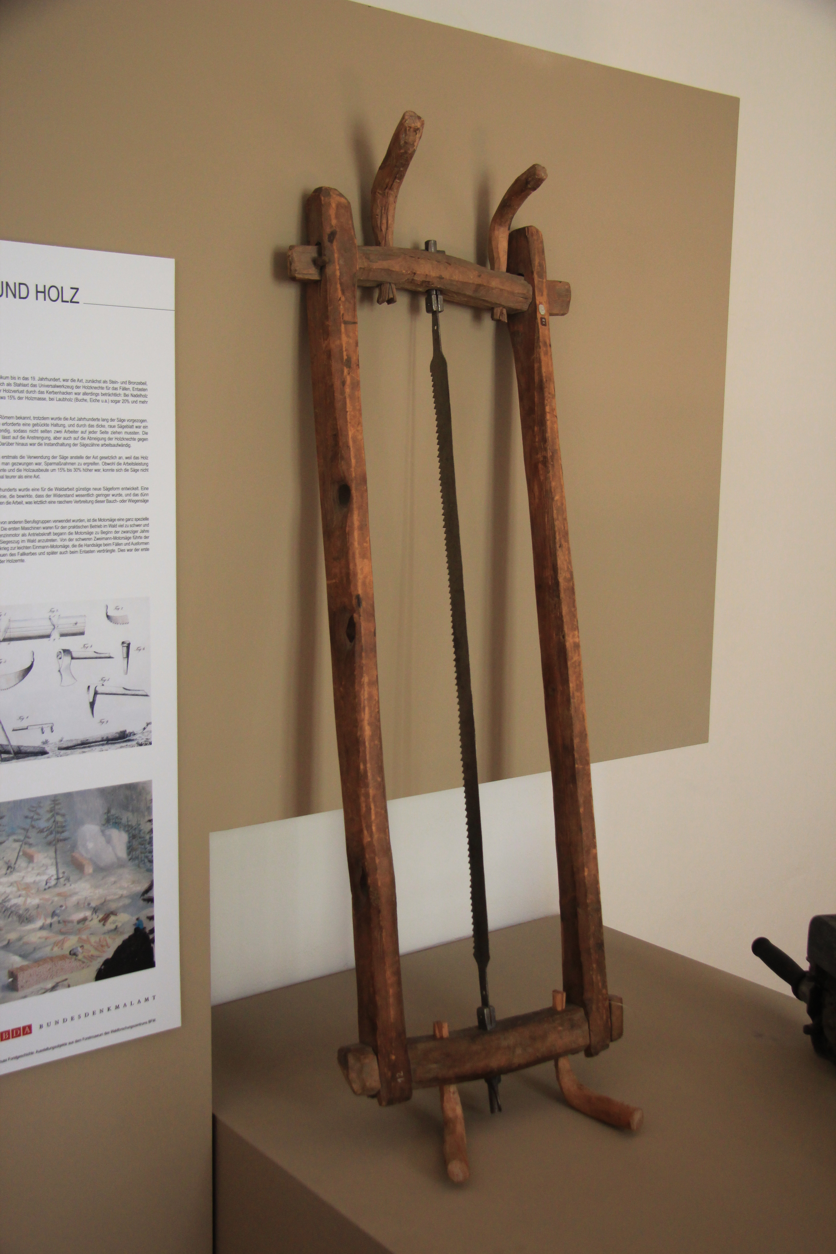 Kartause Mauerbach